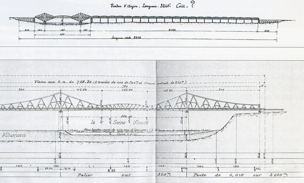 Projet Ligne du Sud-Ouest